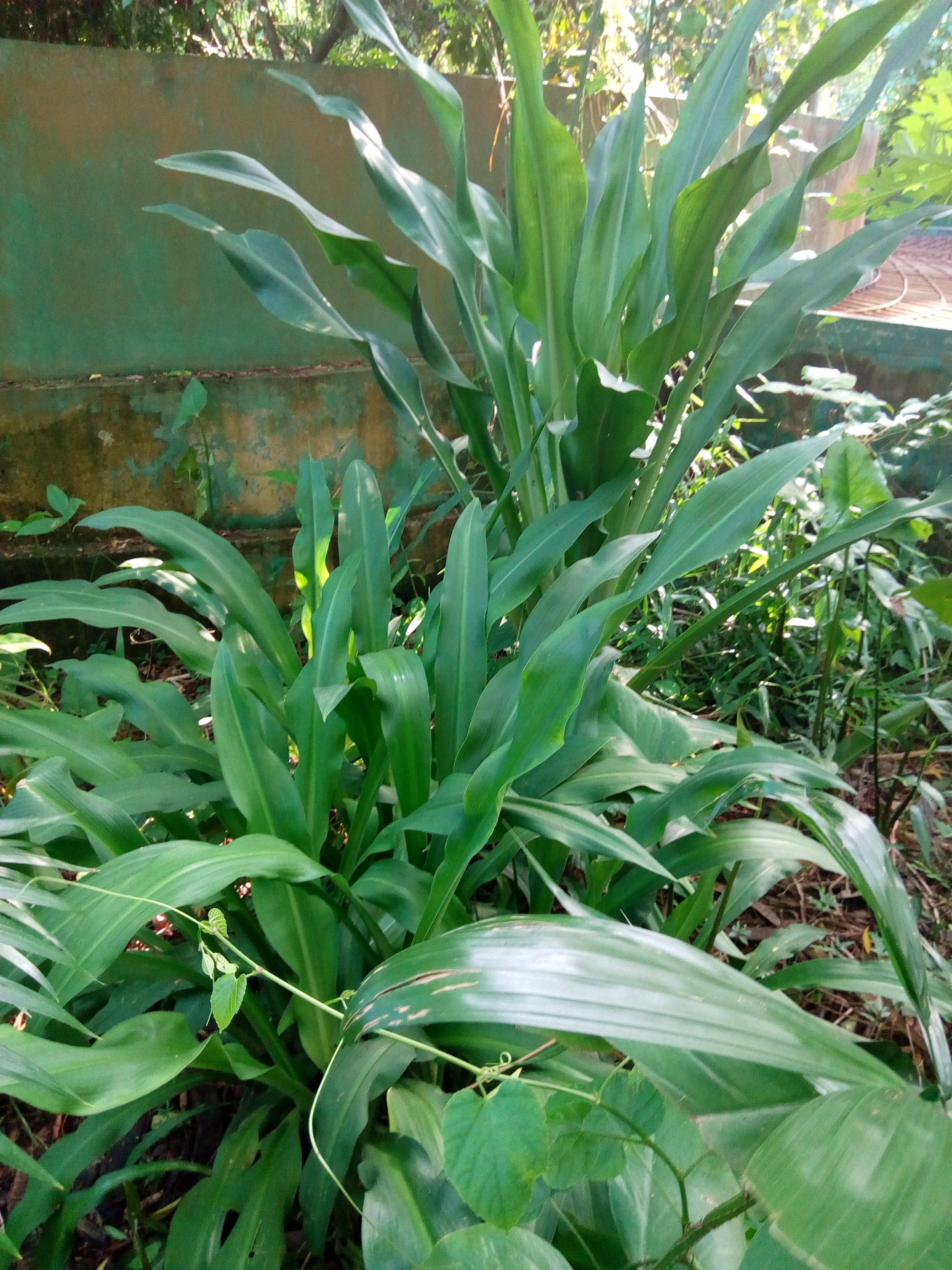 Plante médicinale du jardin botanique et zoologique de l'Université d'Abomey-Calavi